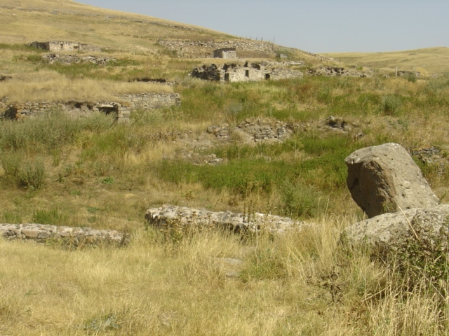 მესხური ნასოფლარი